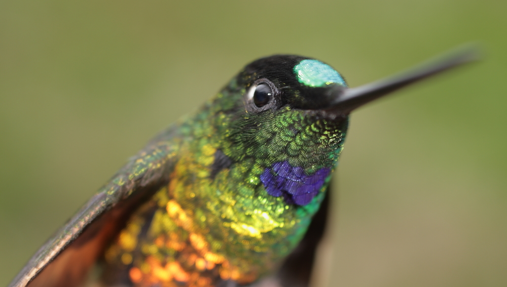 Coeligena bonapartei consita Birds of Serranía de Perijá of Colombia and Venezuela (Ornitologia Colombiana [2014] 14: 62–93)